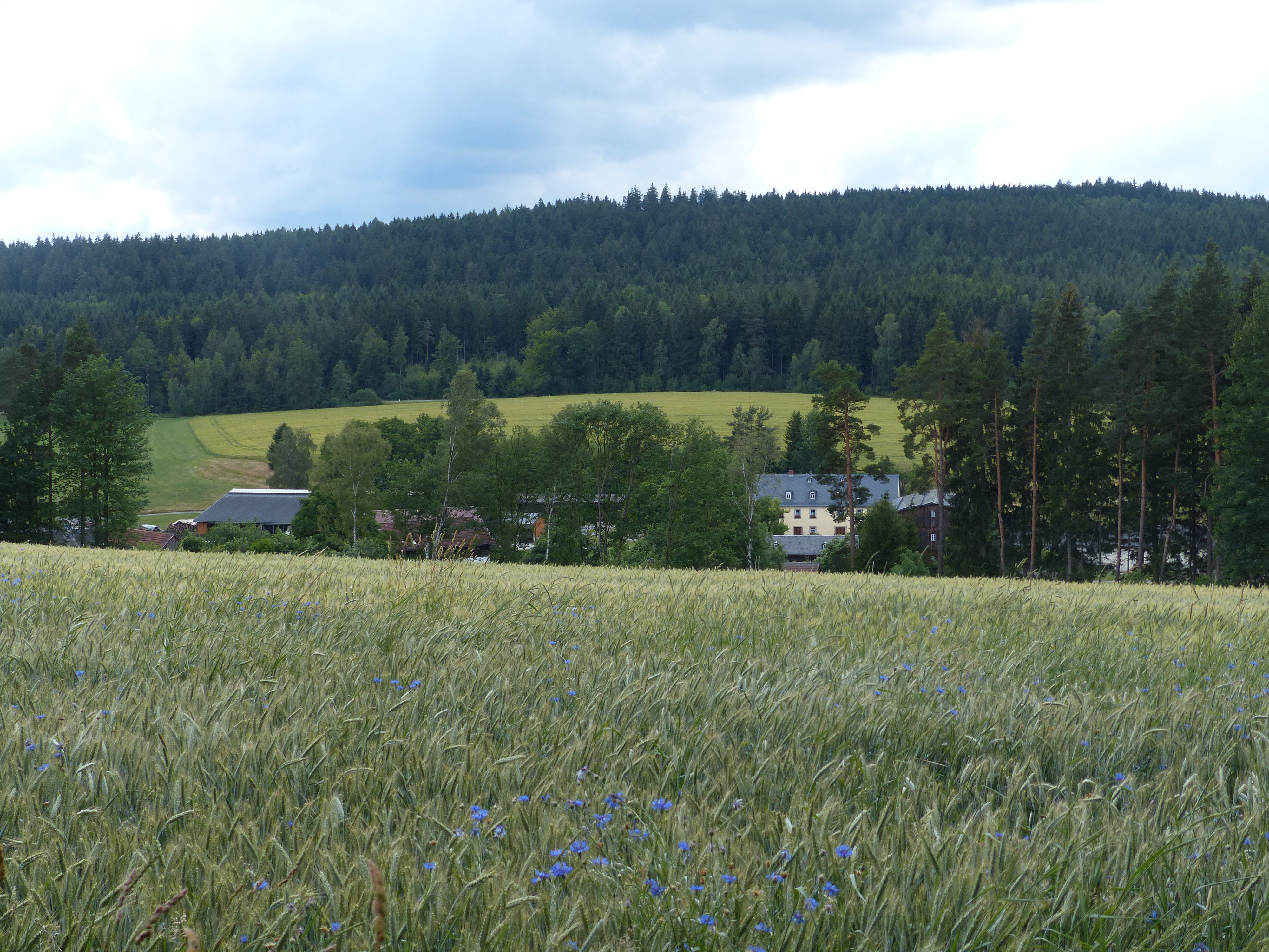 Ortsansicht